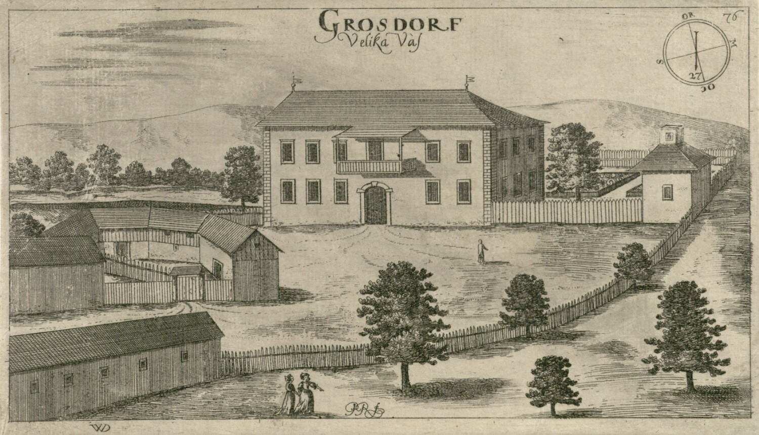 Gradič Velika vas (Grossdorf)